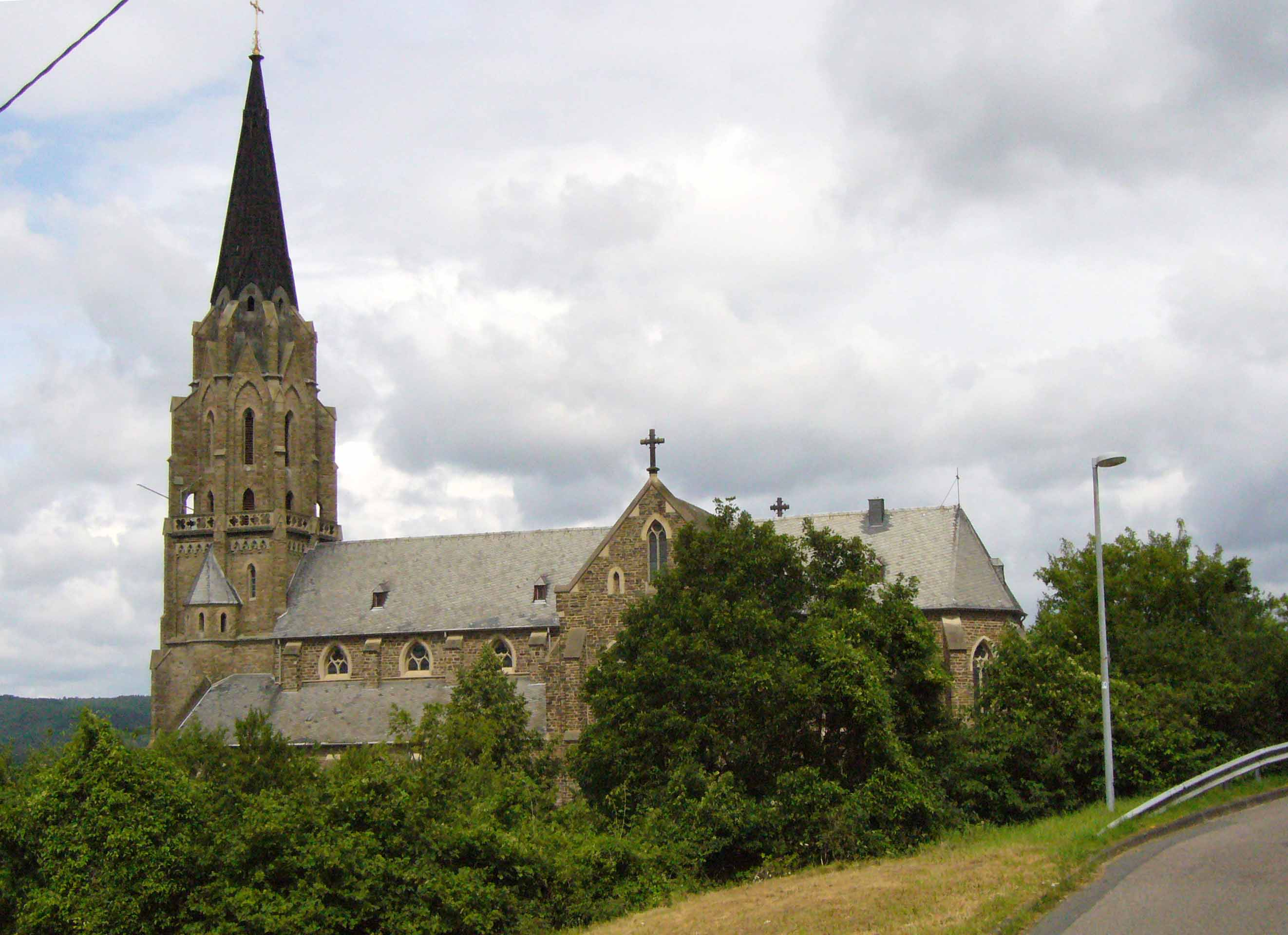 St.Suibertus